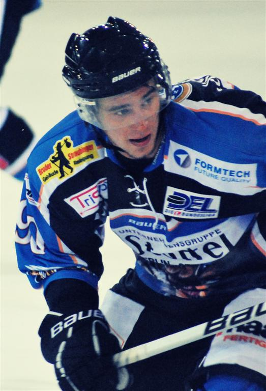 Michael Baindl